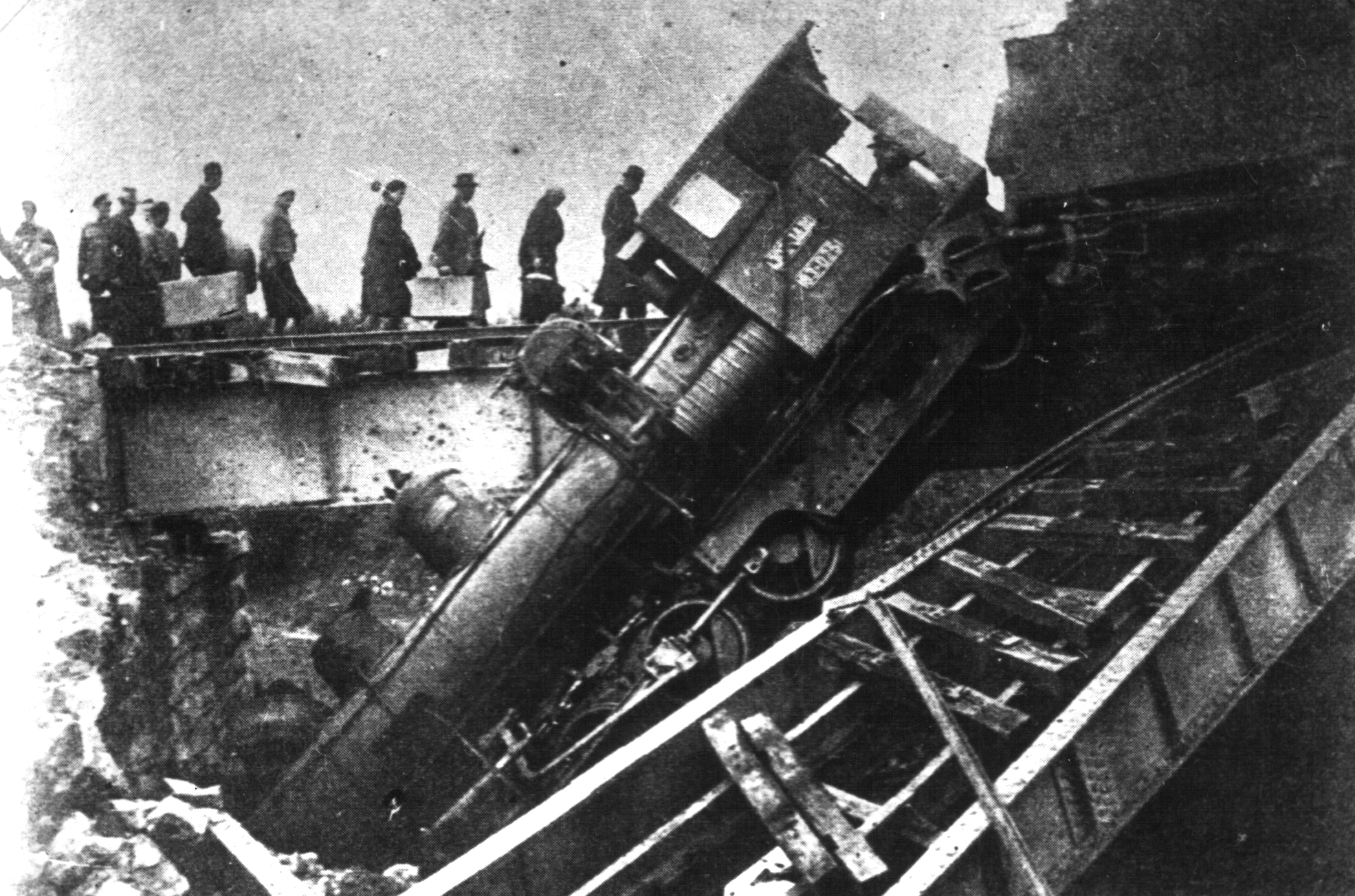 Srpskohrvatski / српскохрватски: Diverzantska akcija u Srbiji 1941.